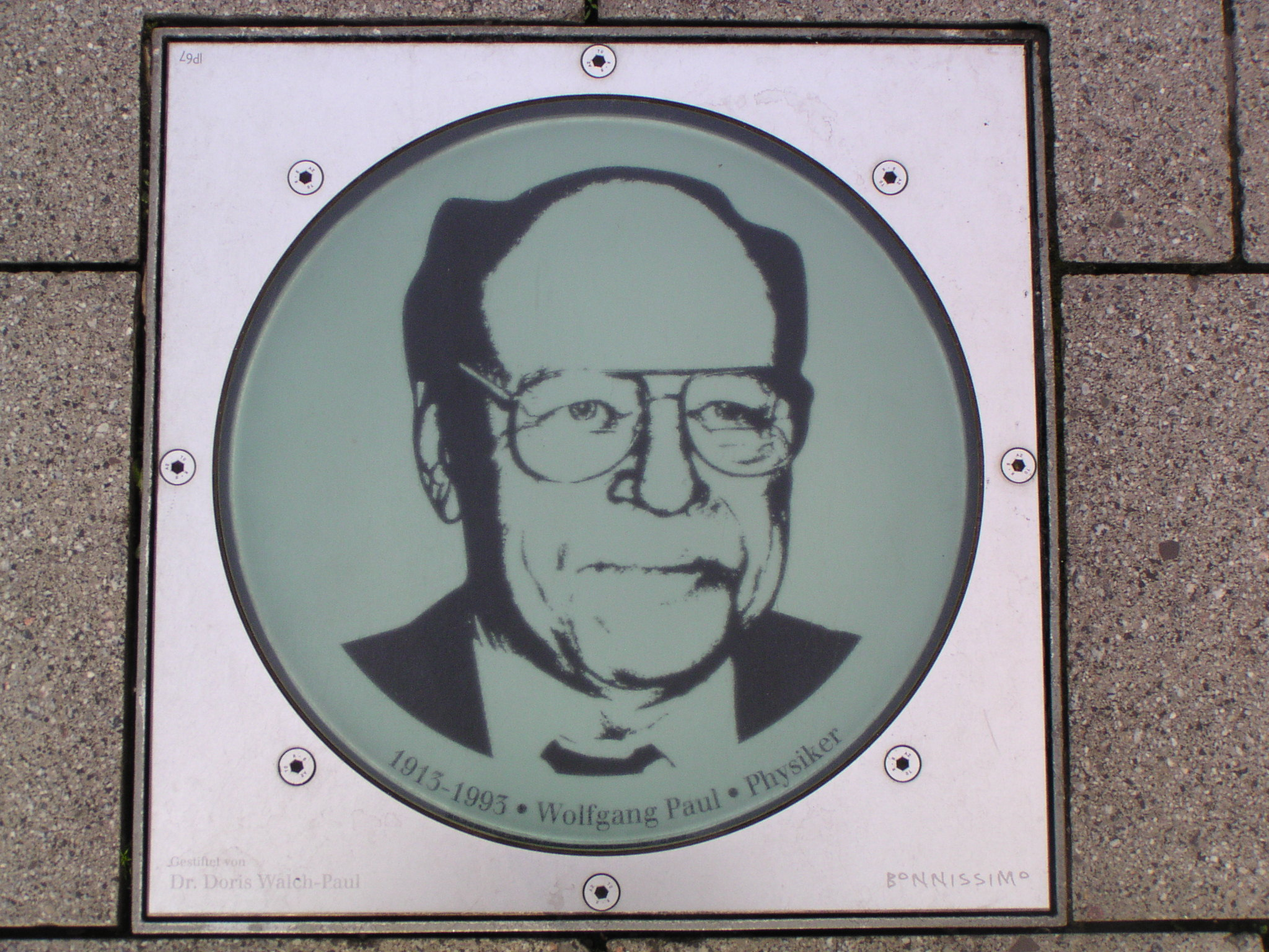 Weg berühmter Persönlichkeiten (Friedrichstraße, Bonn)